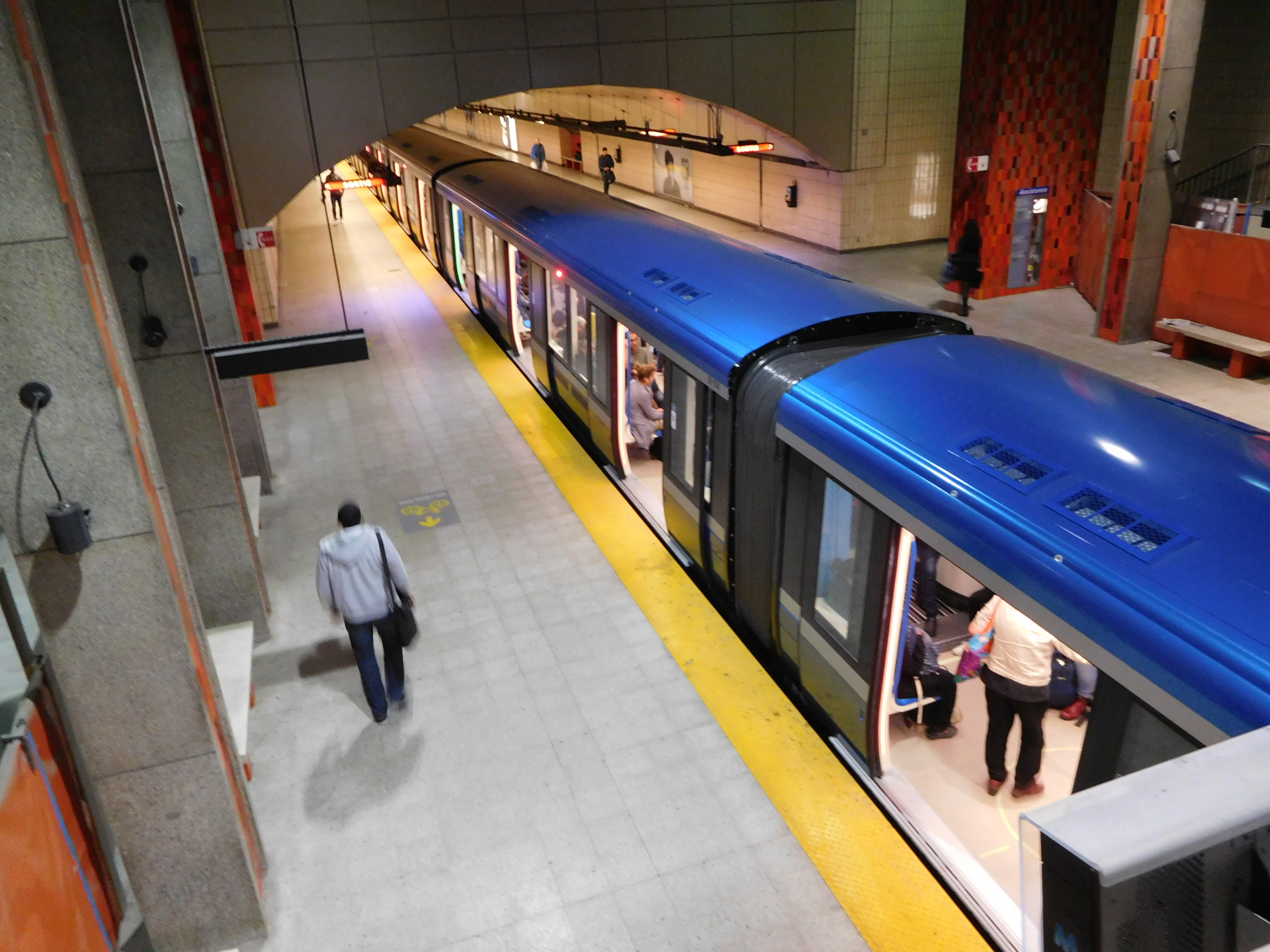 Le MPM-10 (acronyme pour « Matériel pneumatique de Montréal 2010 ») ou Azur, à la station Rosemont